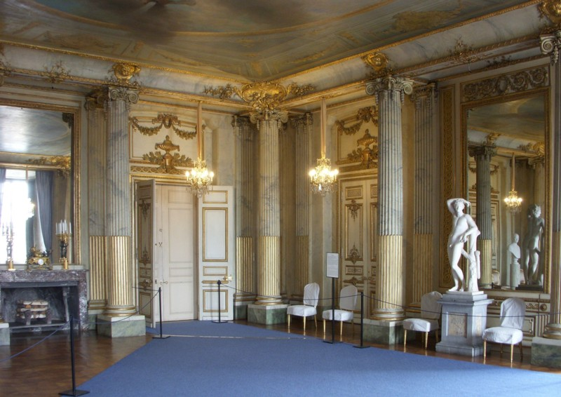 Stockholms slott, Pelarsalen